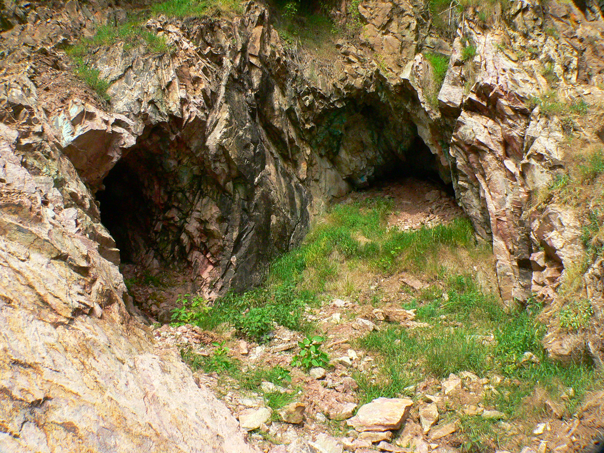 ehem. Kupferbergwerk "Grube Wilmelmine" in Sommerkahl bei Aschaffenburg, Deutschland - alte Stollen von 1871